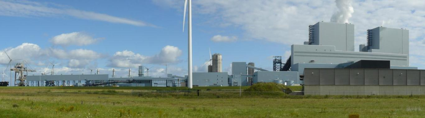 De Eemshavencentrale van RWE. Links is nog net de loskade voor de steenkool zichtbaar en geheel rechts de centrale. (Deze foto is samengesteld uit drie foto's en daarom enigszins vervormd.)